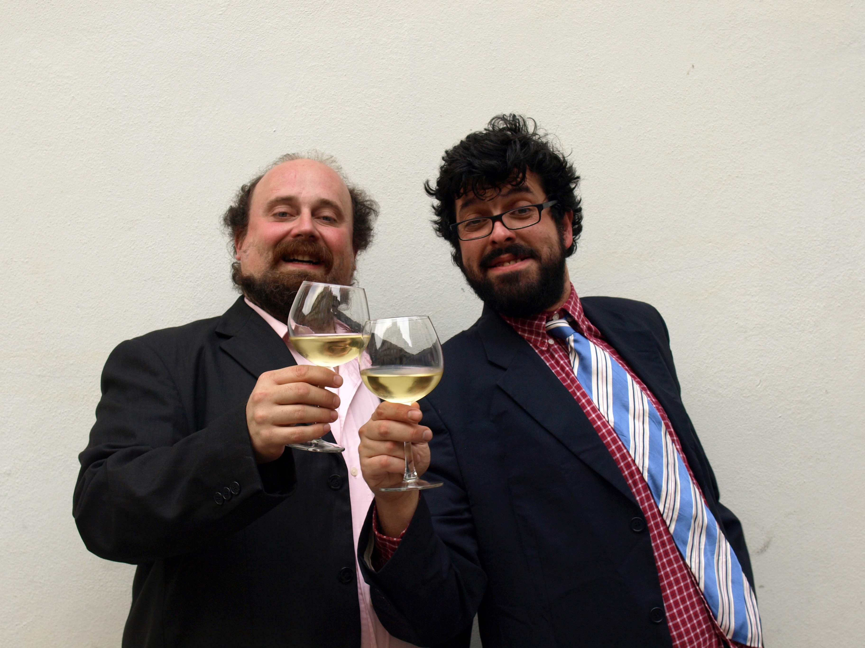 Os da ria